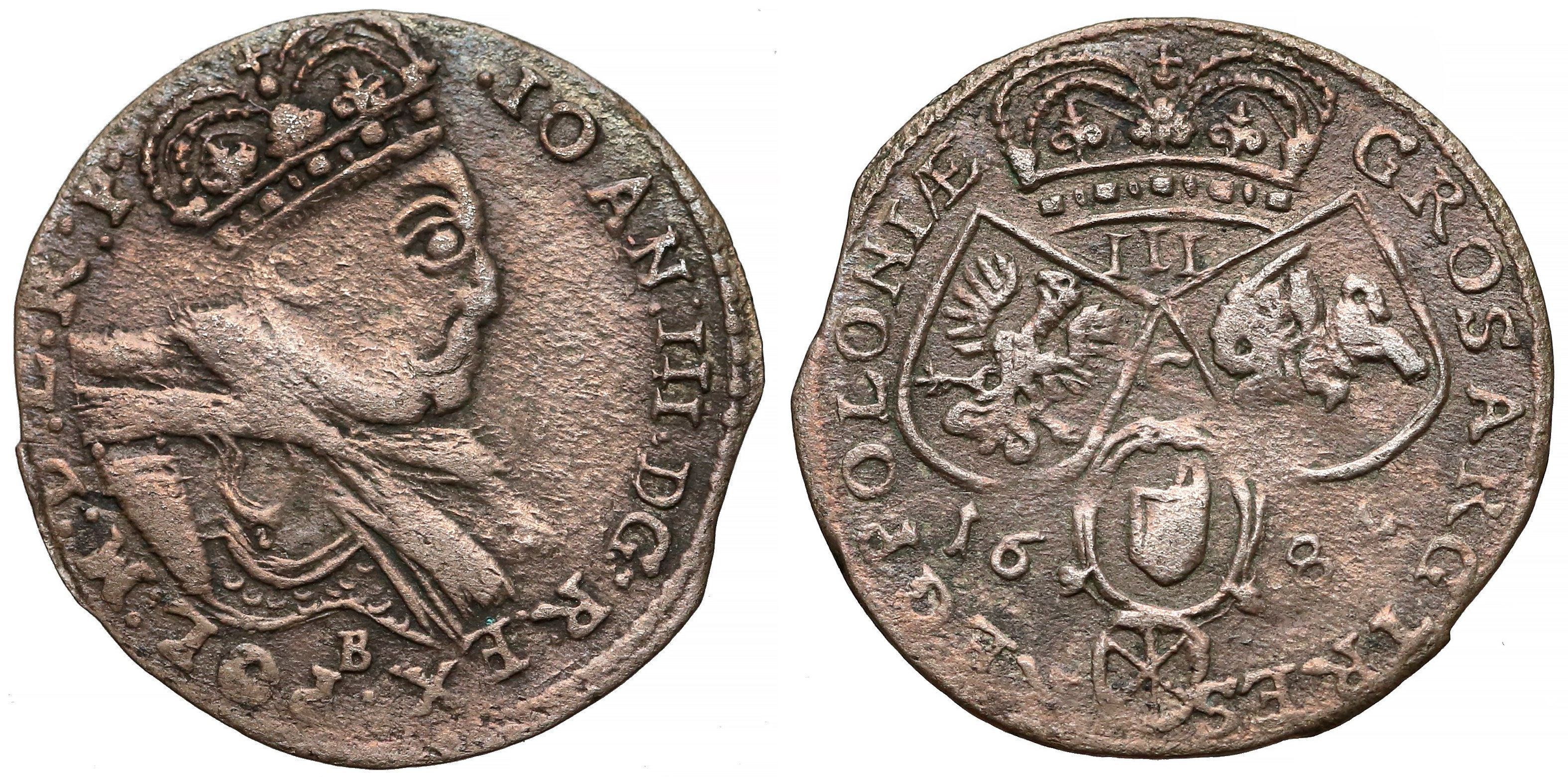 Trojak koronny 1684 Kraków